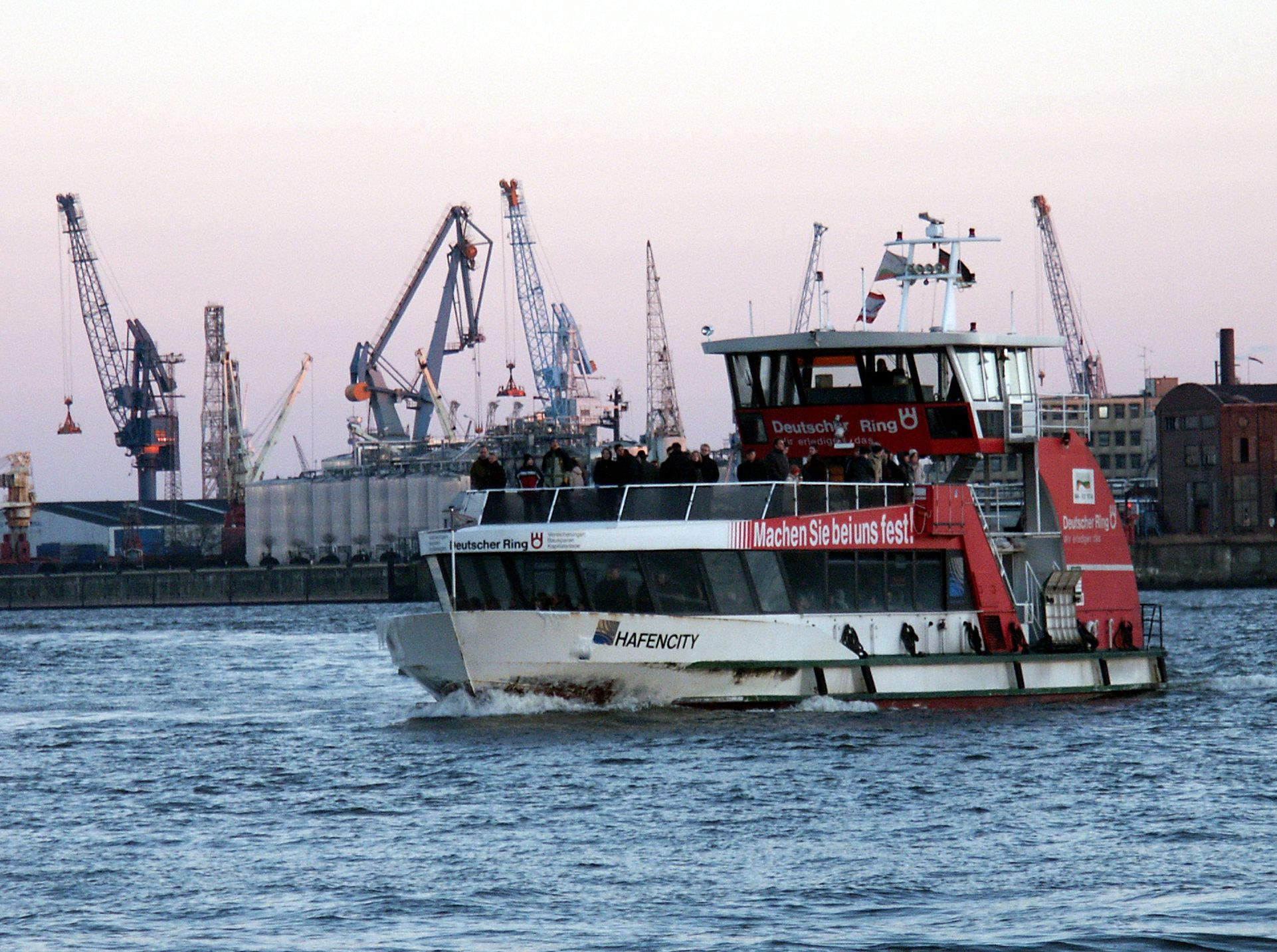 Hafenfähre 62 in Hamburg (2003), ÖPNV/HVV